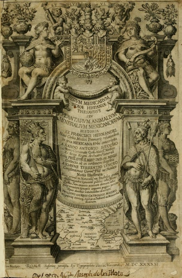 Hernandez, Rerum Medicarum (Rome, 1628) tp